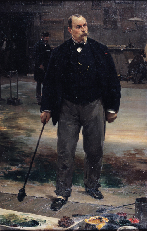 Le peintre Auguste-Antoine Rubé (1815-1899) est représenté ici dans l’atelier de décor de l’Opéra de Paris. Le pinceau à la main, il est montré en train de peindre un décor pour une prochaine pièce. La carrière de décorateur de théâtre de Rubé l’amène également à travailler pour d’autres théâtres parisiens, tels que l’Opéra comique ou le théâtre de l’Odéon. Paul Mathey a réalisé plusieurs portraits d’artistes dans leur atelier, comme ceux du peintre et graveur belge Félicien Rops (1833-1898) ou du sculpteur René de Saint-Marceaux (1845-1925), aujourd’hui conservés au musée national des châteaux de Versailles et de Trianon.